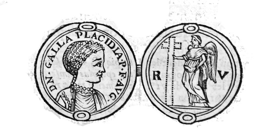 image venant de "Nouveau traité de diplomatique...".